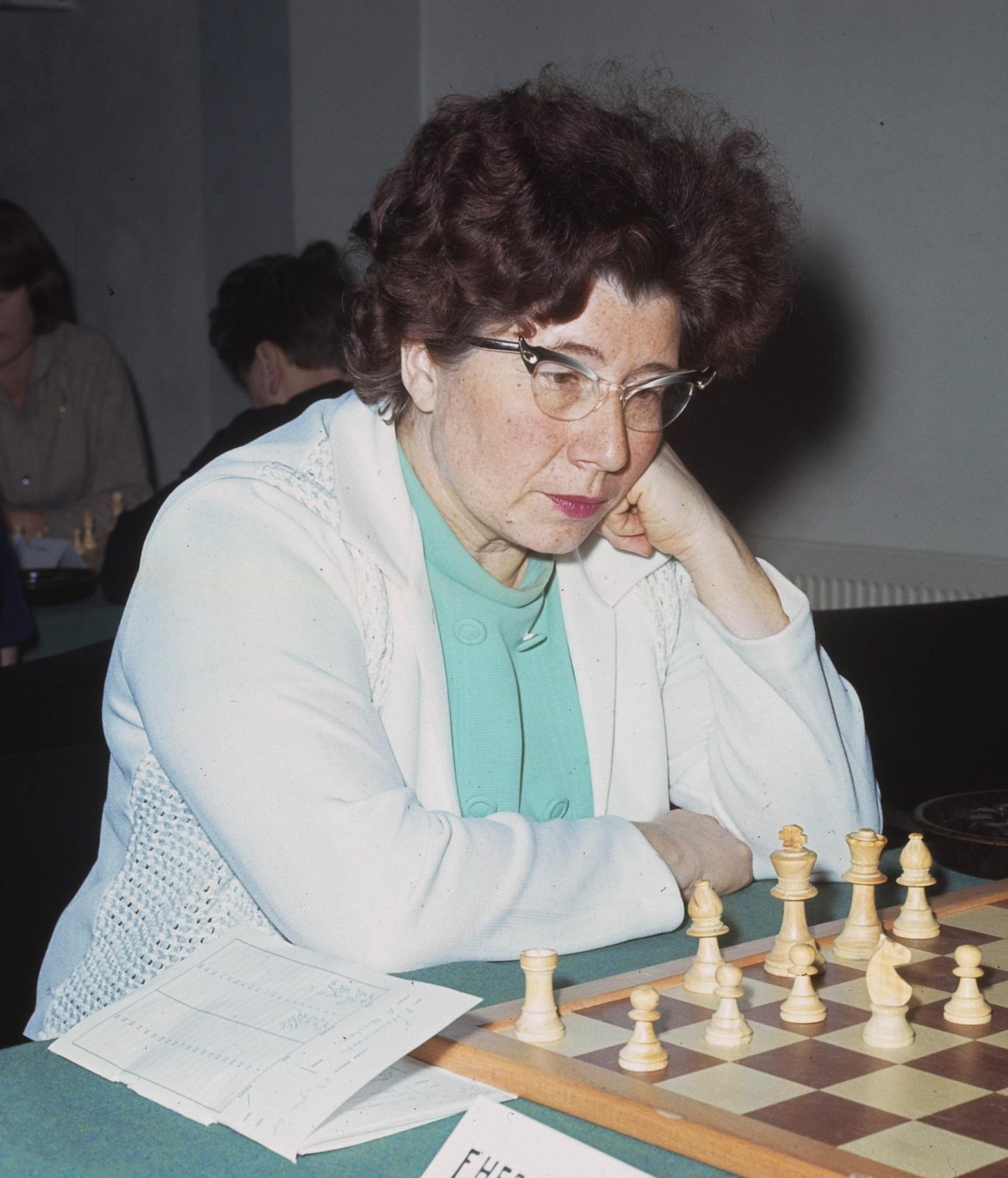 Hoogovenschaaktoernooi te Beverwijk; mevrouw Heemskerk , Nederland